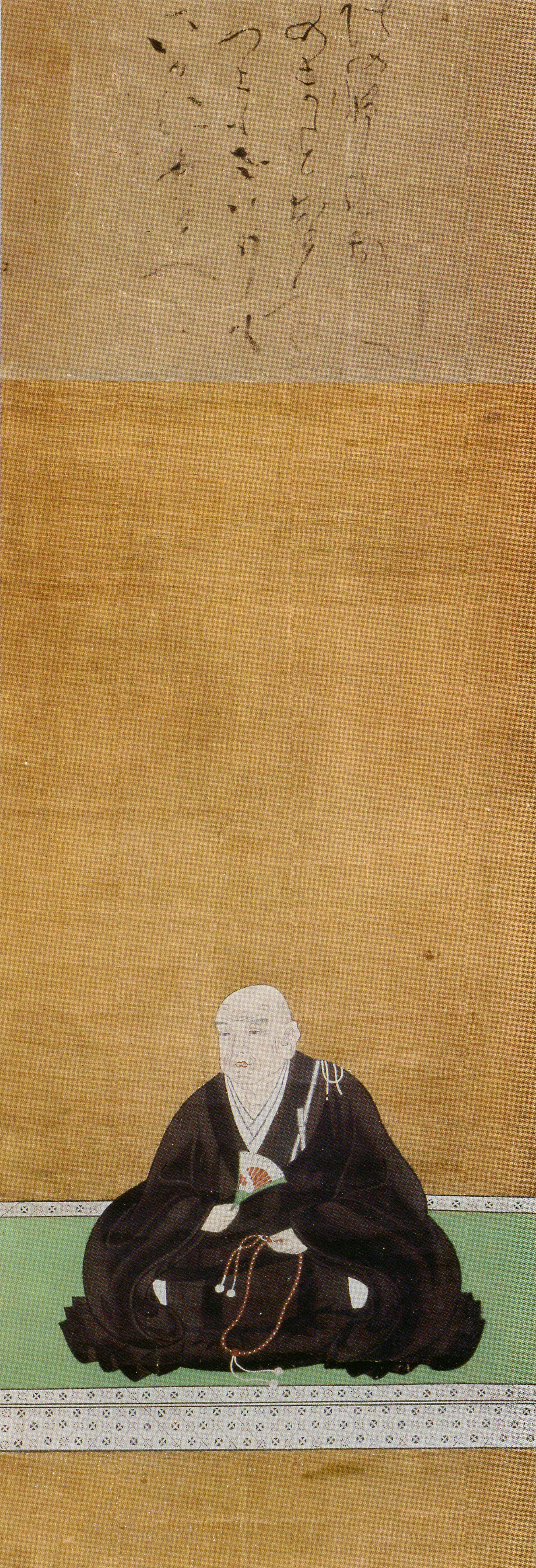 卜半斎了珍の肖像。